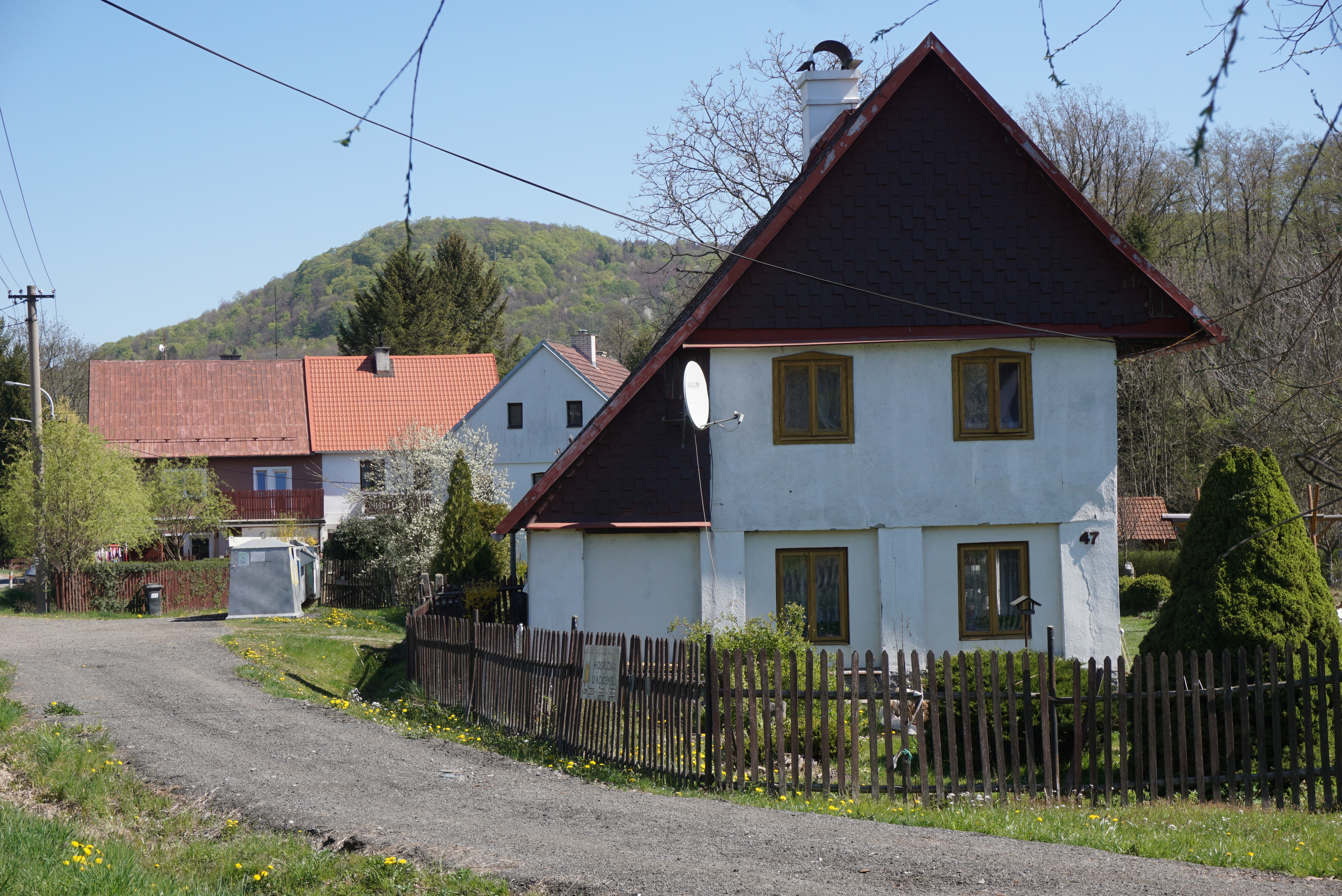 Heřmanice (Hermsdorf, u Žandova) - dům čp. 47 a jeho okolí (čp. 48, 49 a 50)